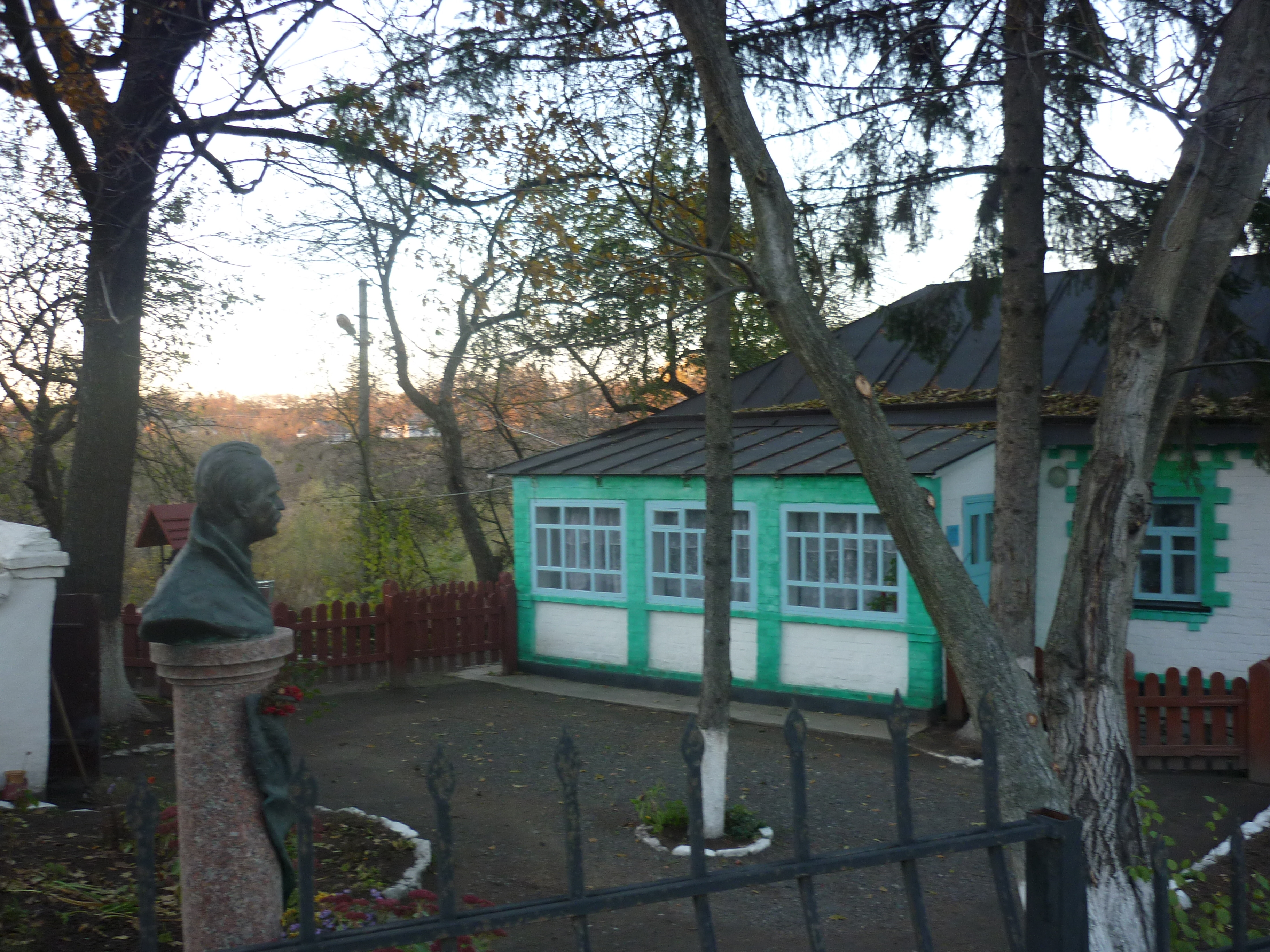 Садиба-музей В.Чорновола, село Вільховець Звенигородського району